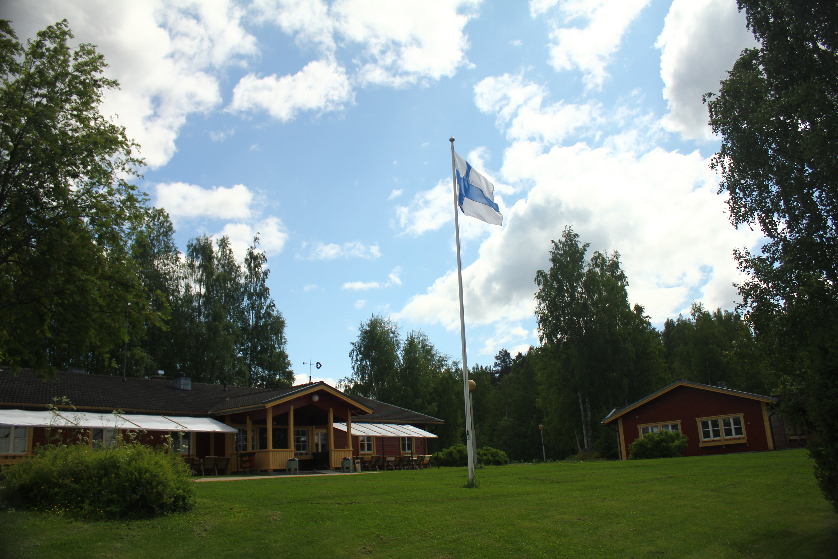 Näkymä Puustellin päärakennukselle kesällä 2017.